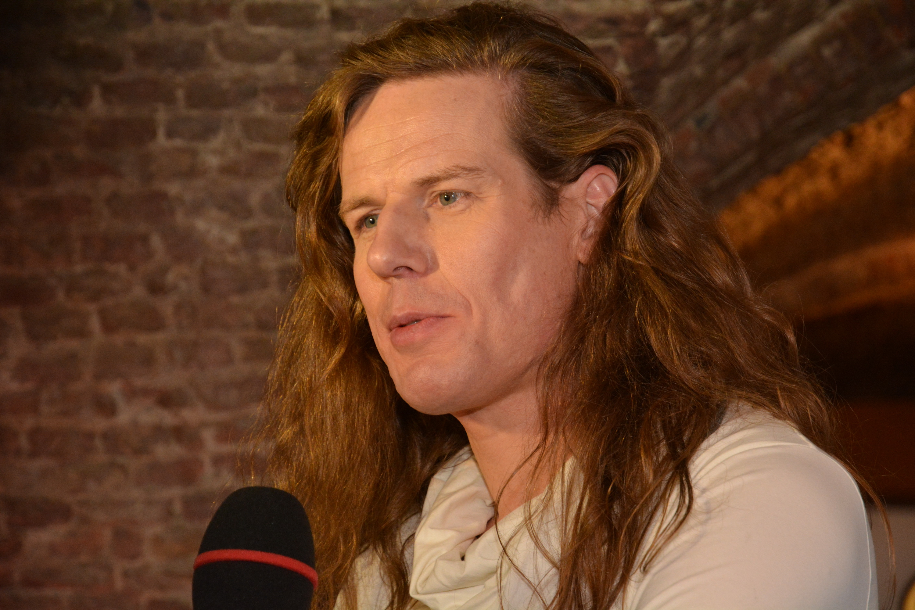 Lieven Debrauwer tijdens de persvoorstelling van het nieuwe seizoen van kunstencentrum Moonbeat in Mechelen.